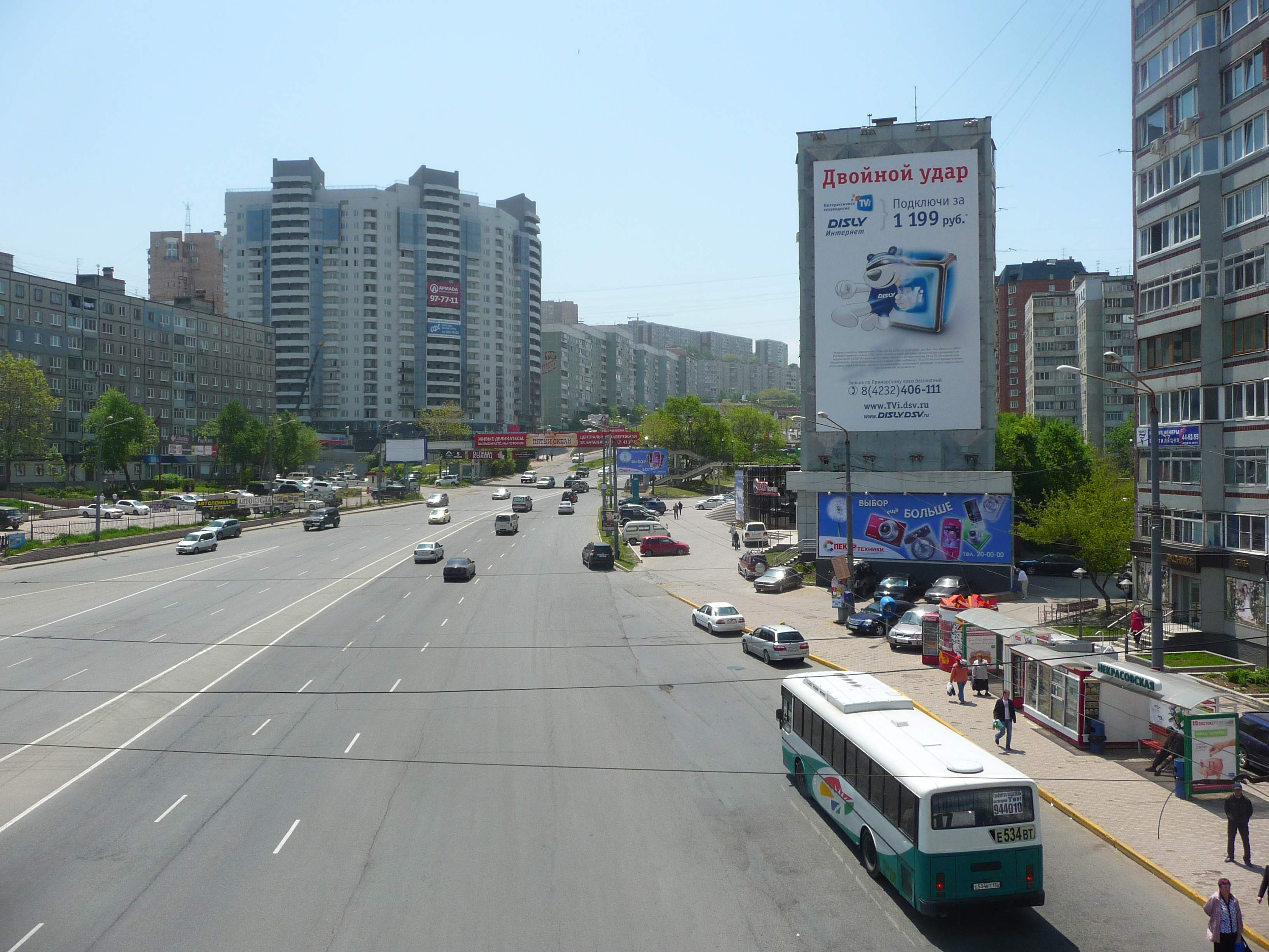 Проспект Столетия Владивостока, район Некрасовской, 2010-06-04